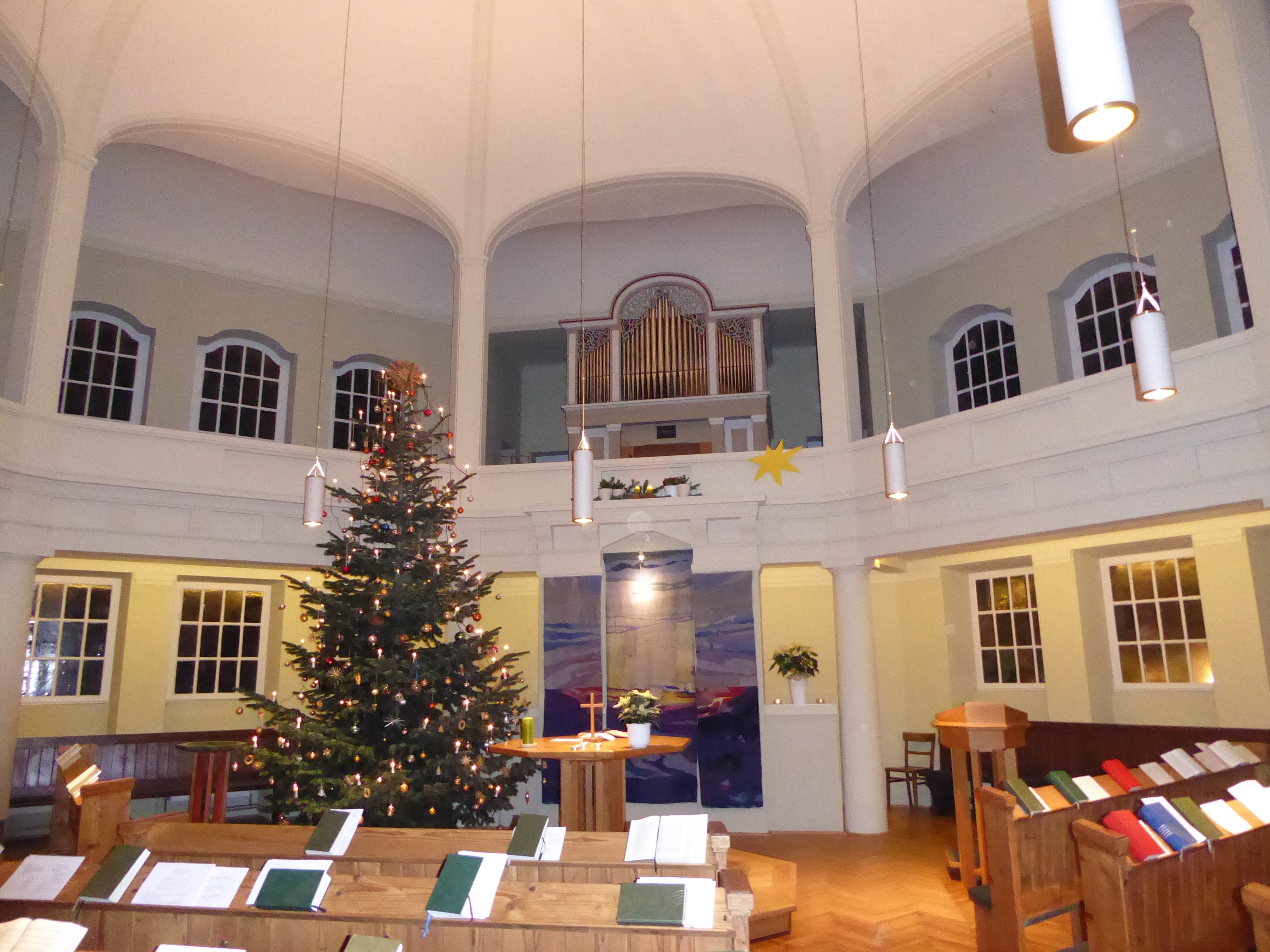 Evang. Pfarrkirche A.B. u. H.B., Heilandskirche, Martin-Luther-Platz 1, Krems, Niederösterreich - nach der Innenestaurierung